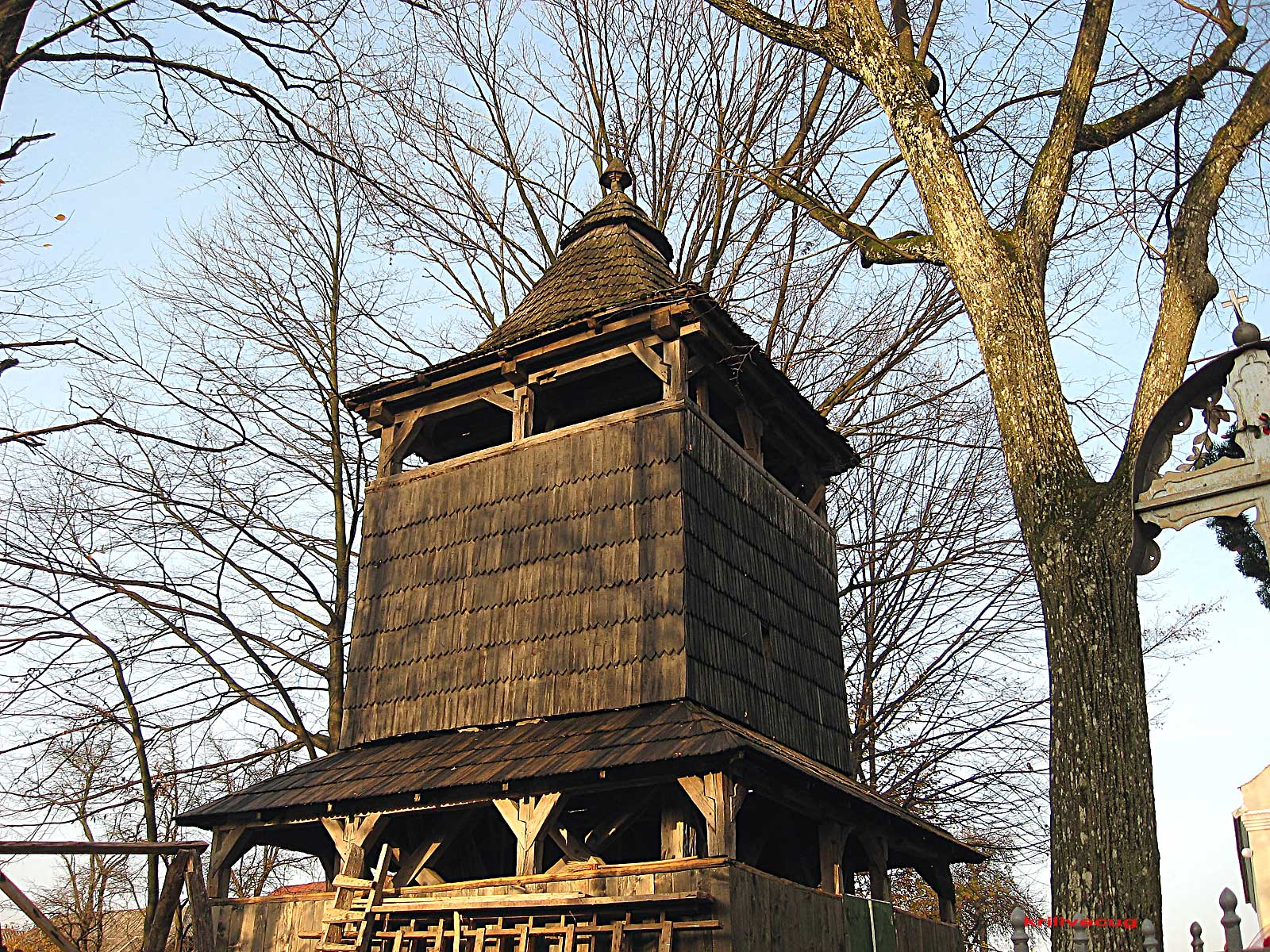 Двоярусна дерев'яна, каркасна дзвіниця в селі Дешковиця. Іршавського району Закарпатської області. Храм Покрови Пресвятої Богородиці. - XVIII століття.